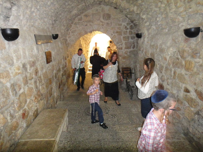 בית הצלם